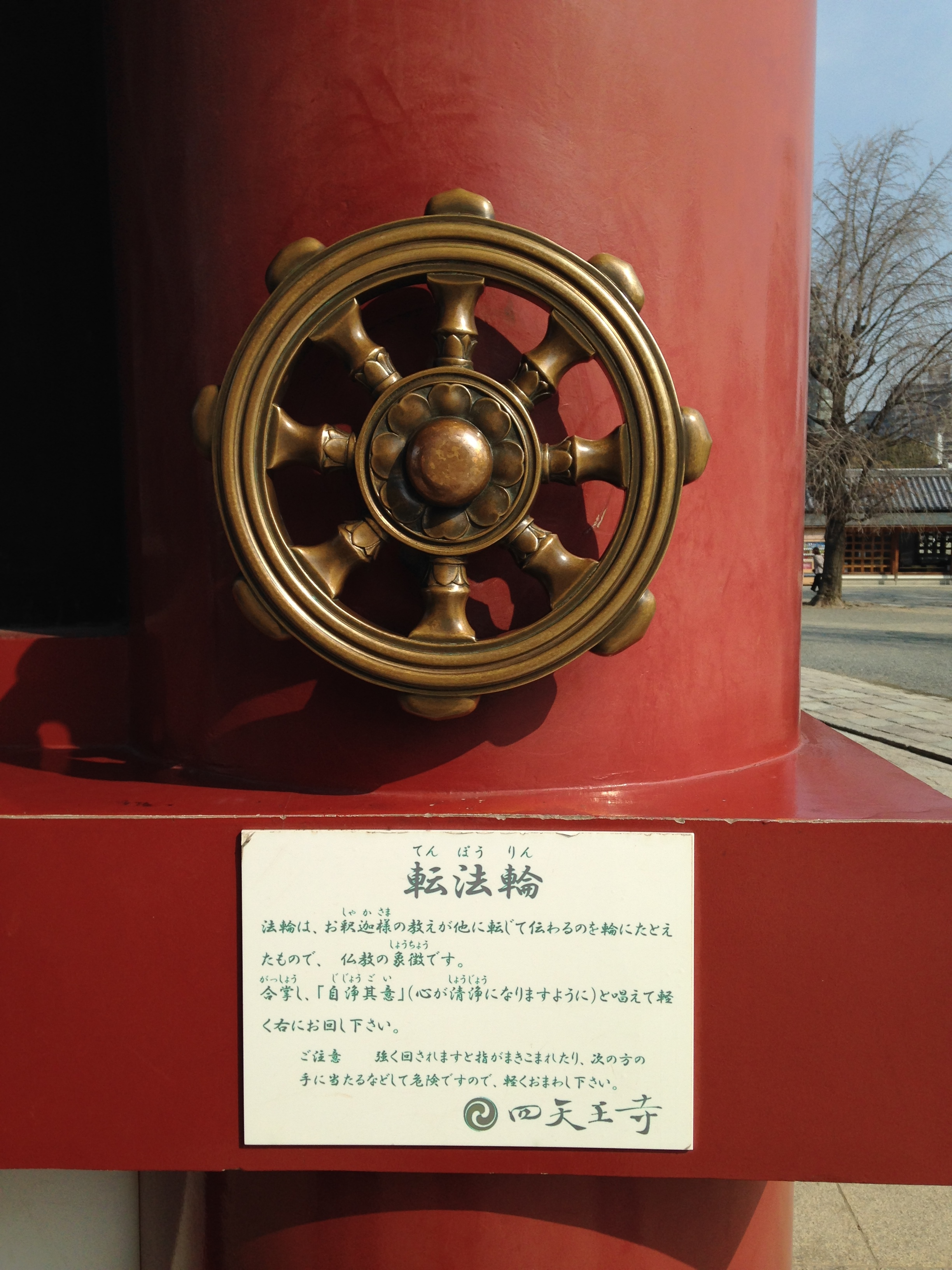 四天王寺・極楽門の転法輪